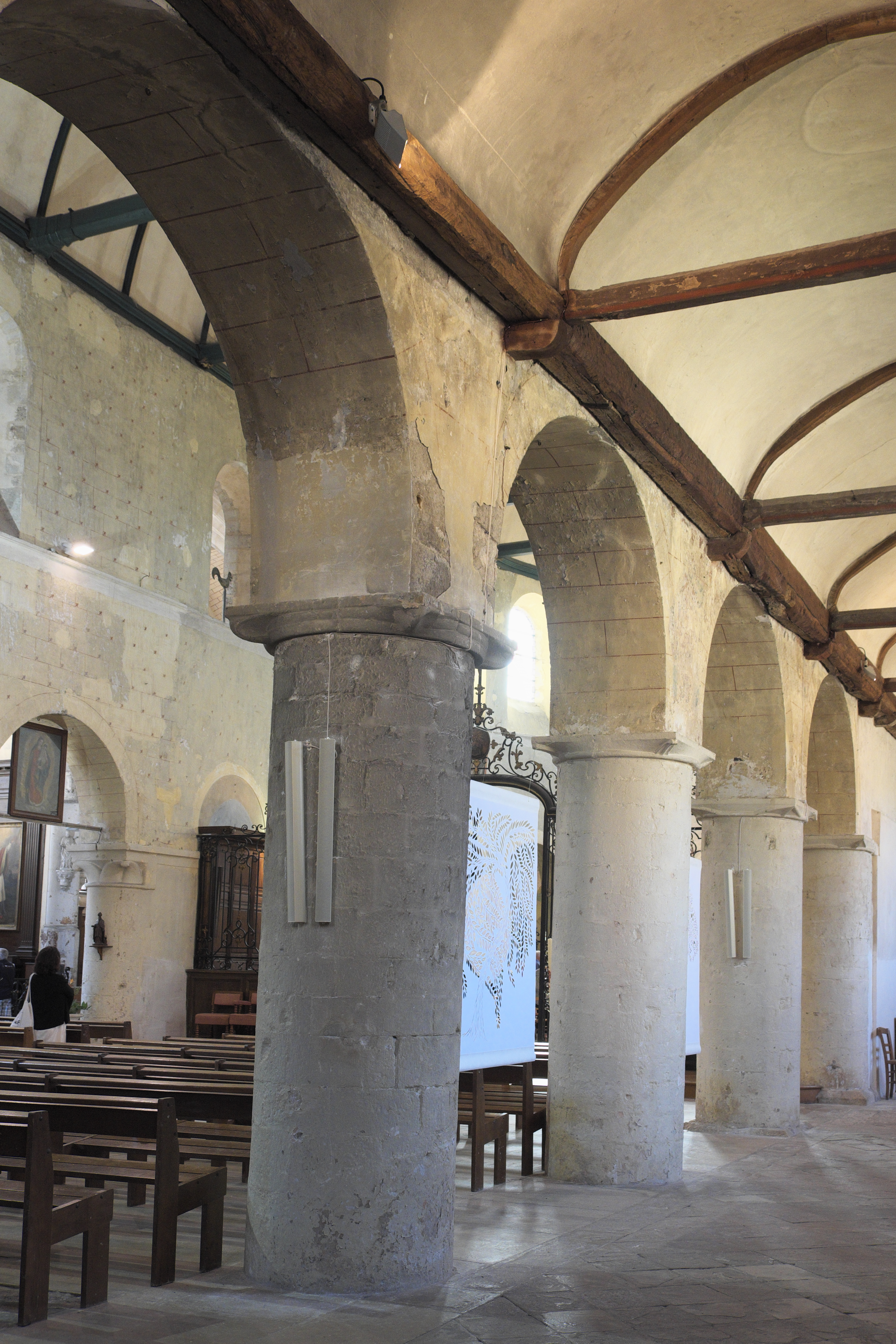 Katholische Kirche Sainte-Croix in Bray-sur-Seine im Département Seine-et-Marne (Region Île-de-France/Frankreich), Innenraum